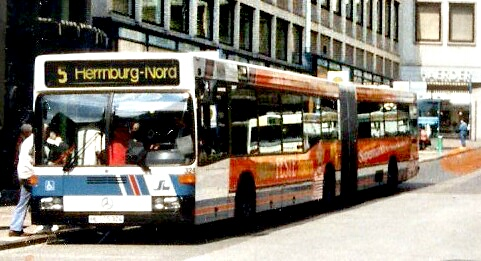 Blick auf die obere Wahmstraße